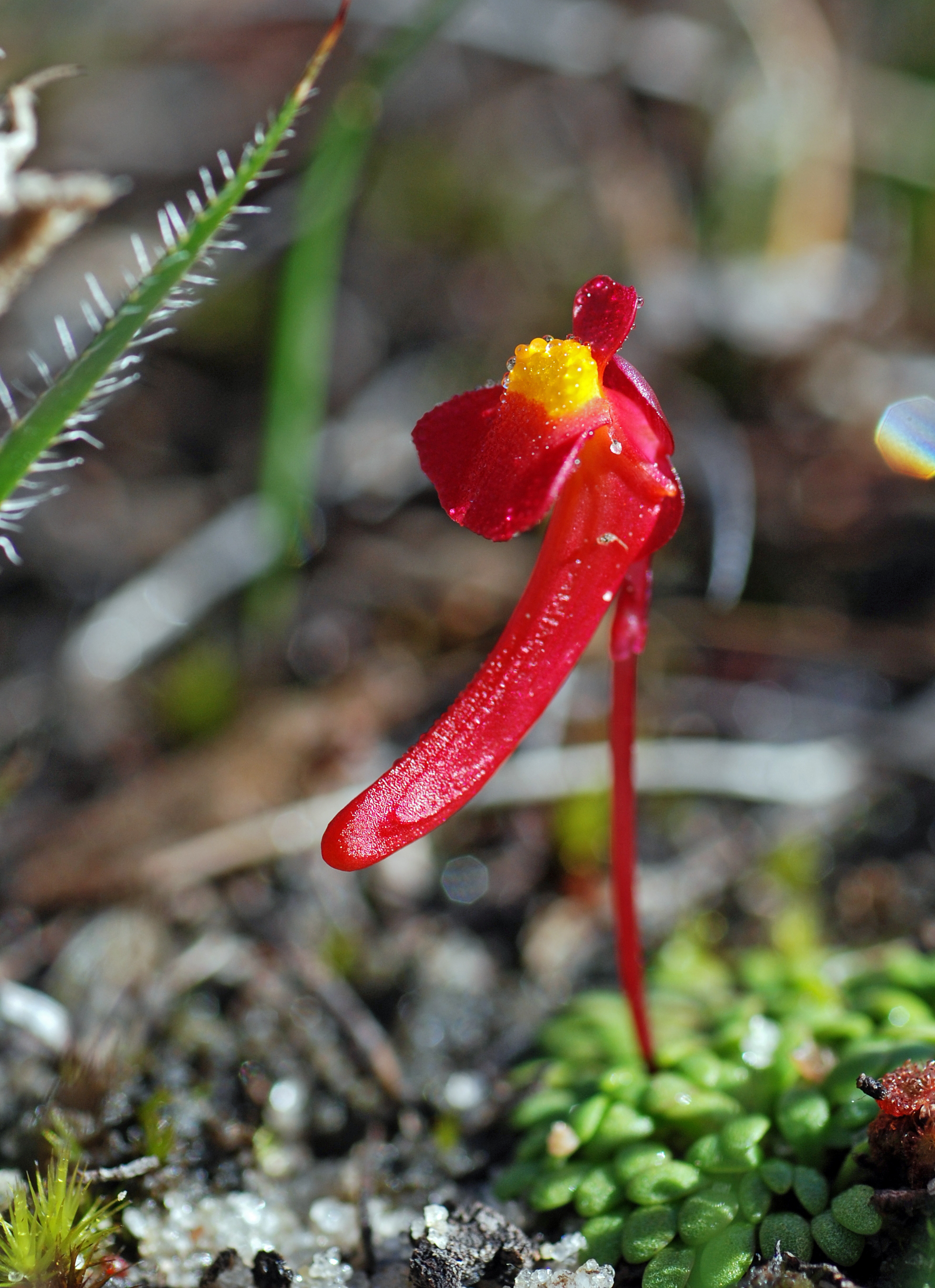 Utricularia menziesii